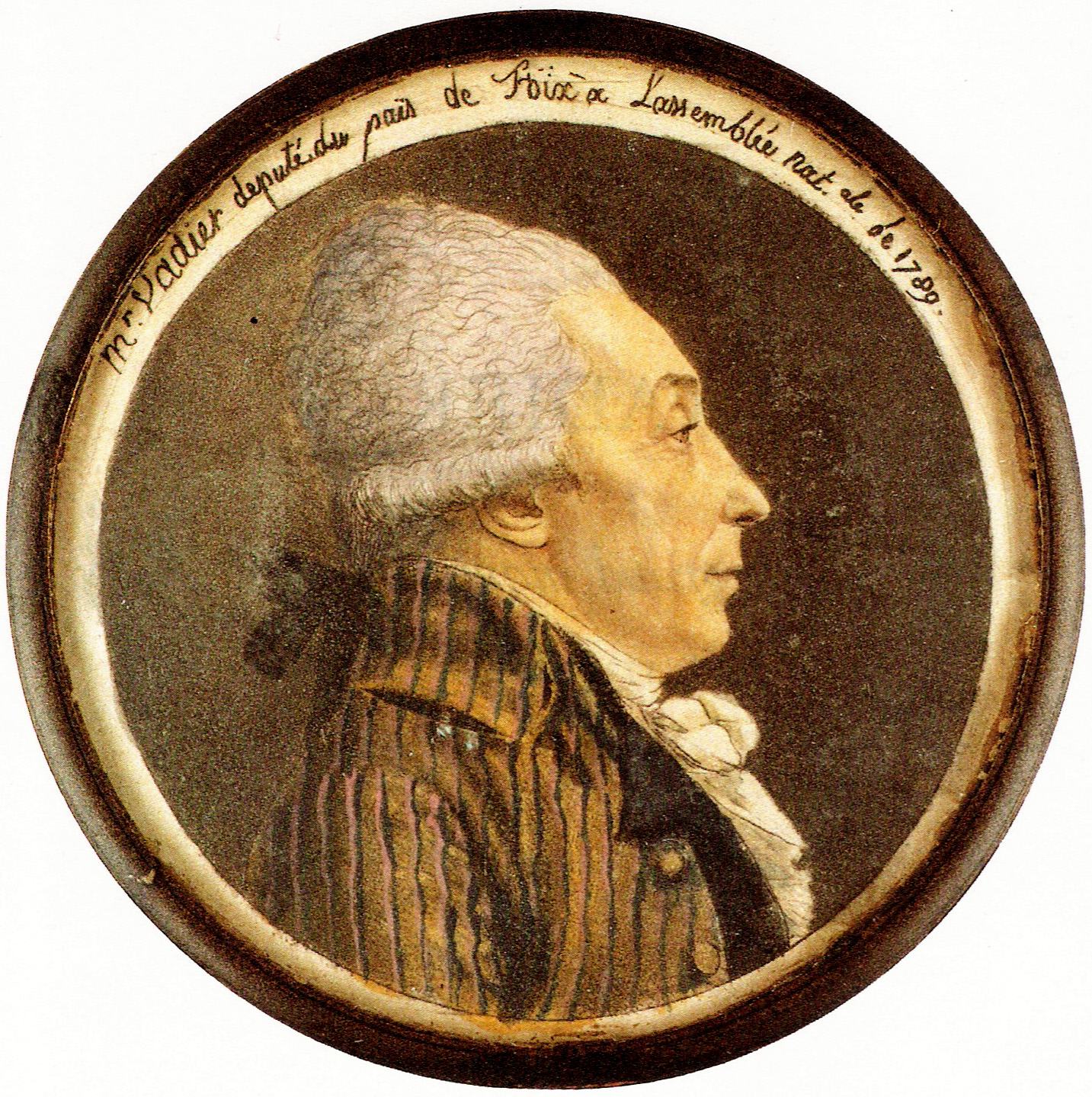 Portrait de Marc-Guillaume Alexis Vadier (1736-1828), révolutionnaire français, peint sur une tabatière lui ayant appartenu.